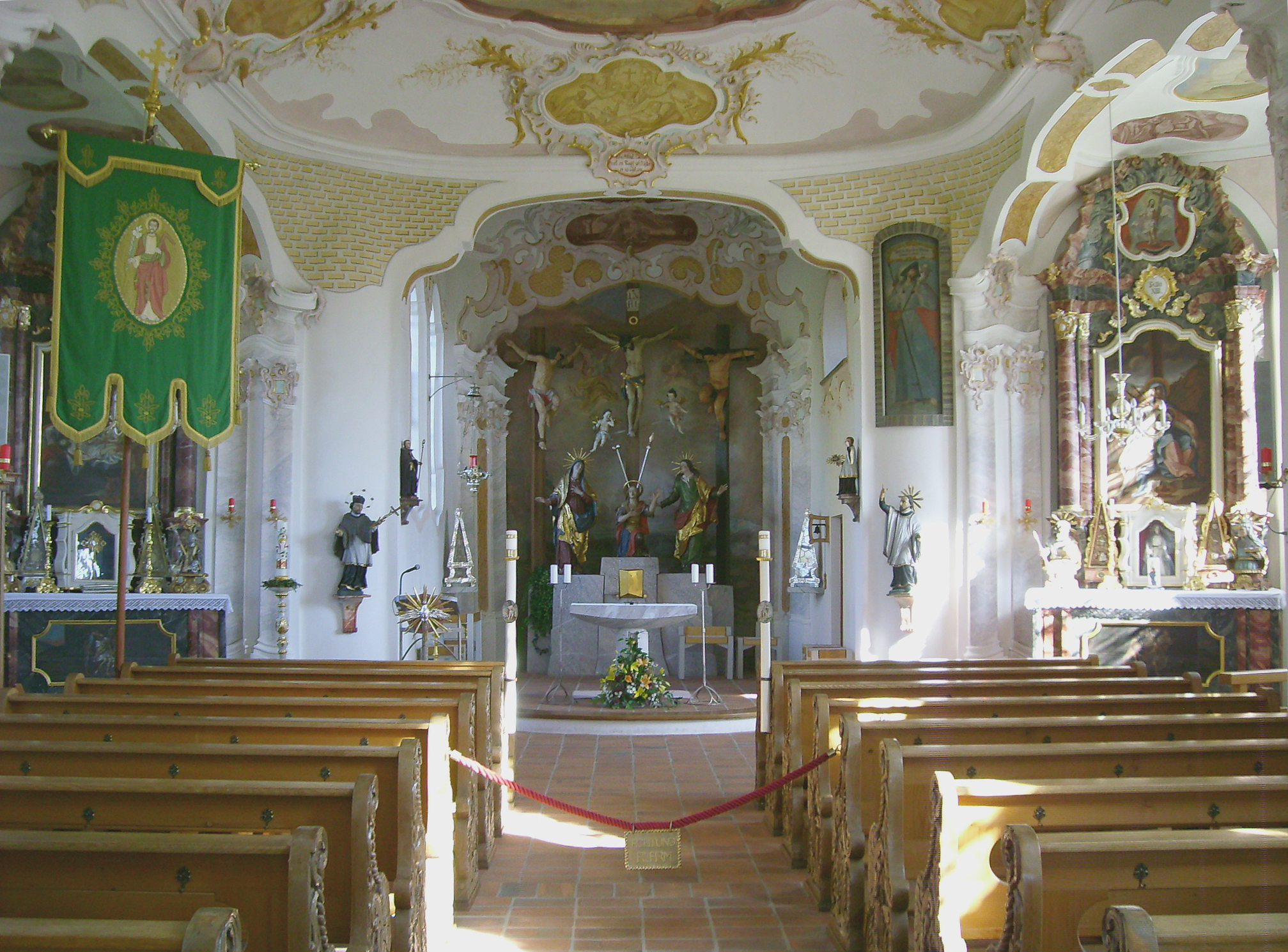 Innenraum von Heilig Kreuz (Mindelaltheim) von Westen aus betrachtet.